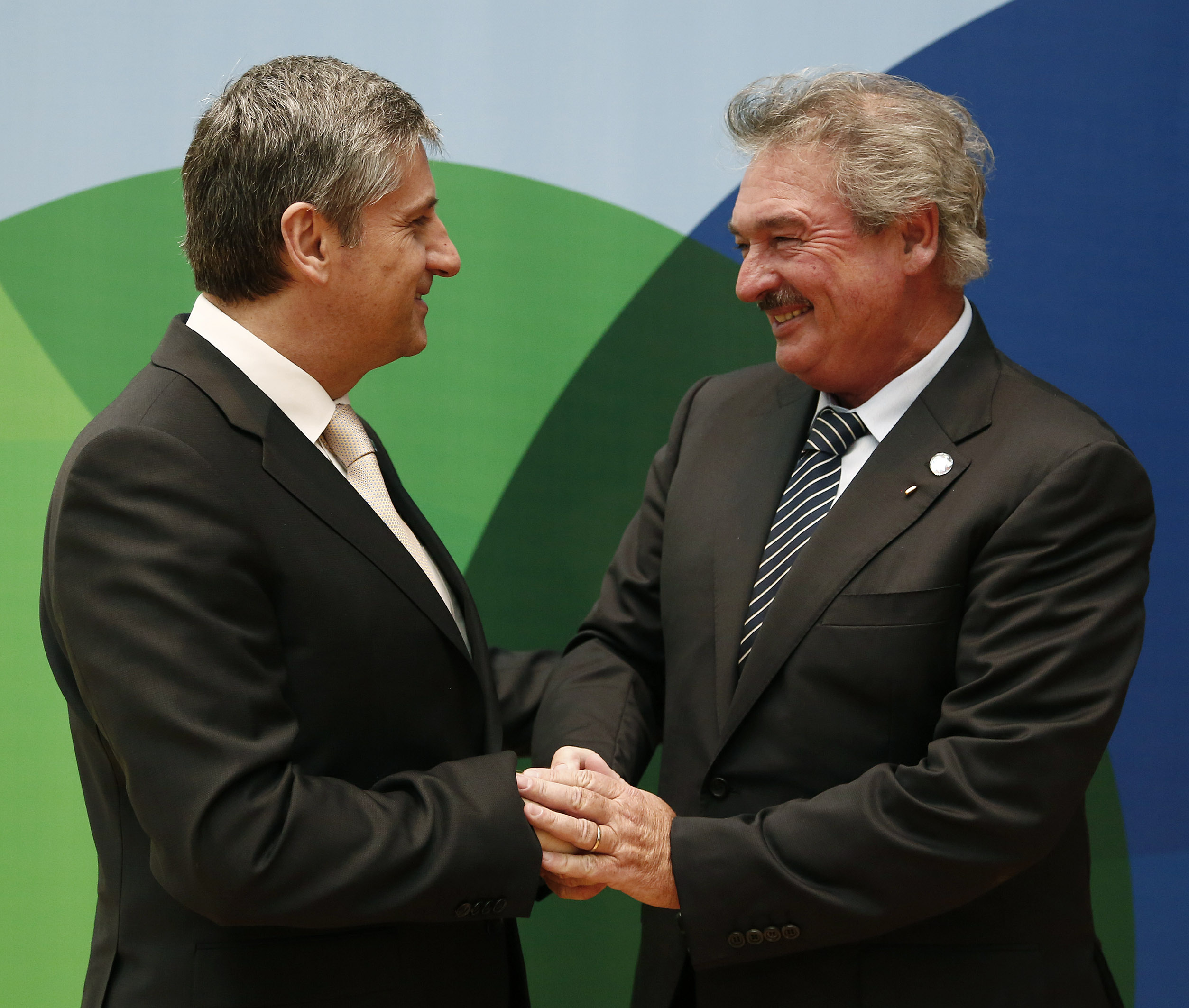 5. Global Forum der Allianz der Zivilisationen der Vereinten Nationen in Wien, 27./28. Februar 2013; Aussenminister Michael Spindelegger mit dem luxemburgischen Aussenminister Jean Asselborn; Foto: Dragan Tatic